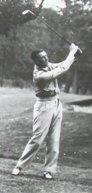 Ald Padgham, Engels golfer